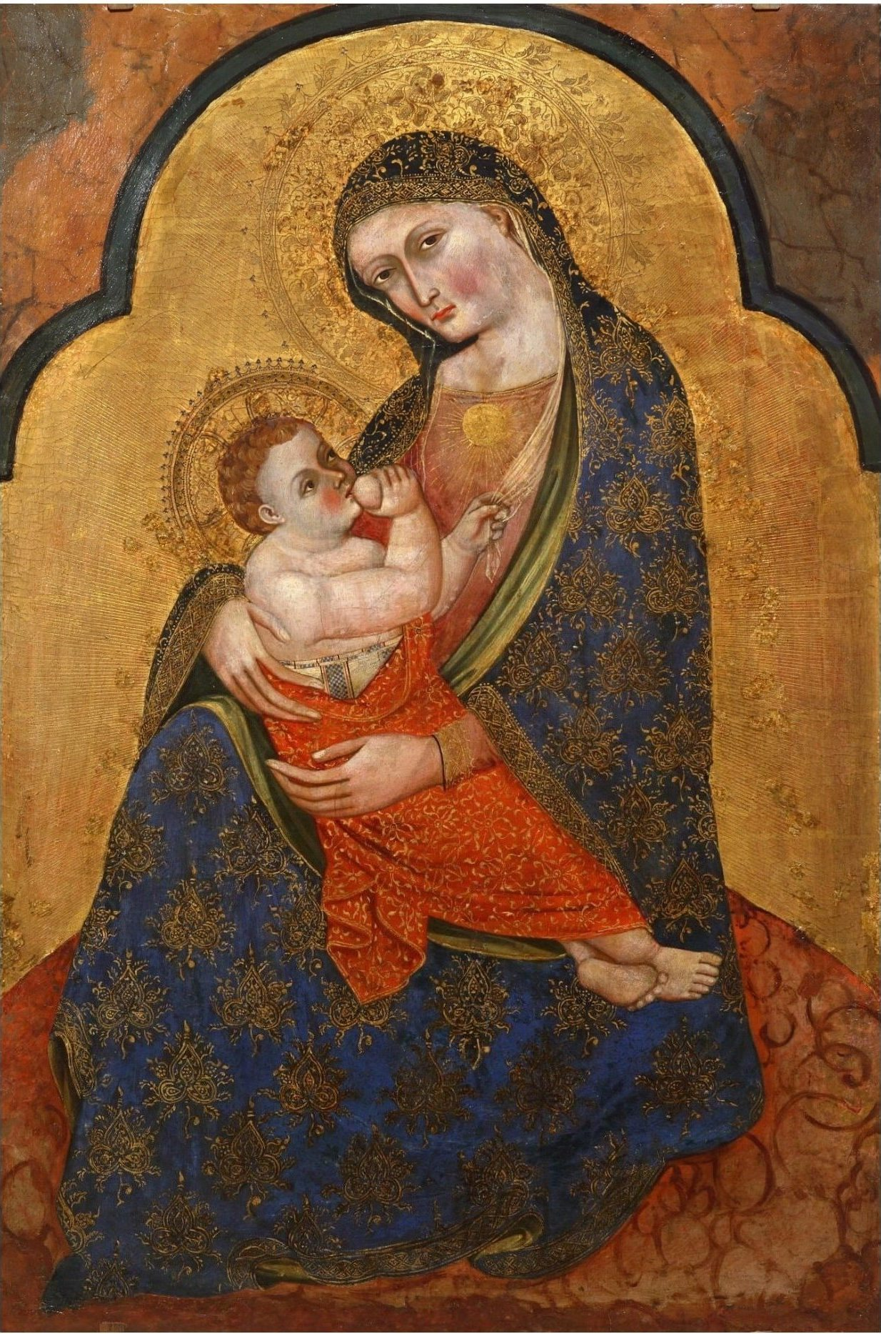 Madonna dell'Umilta.